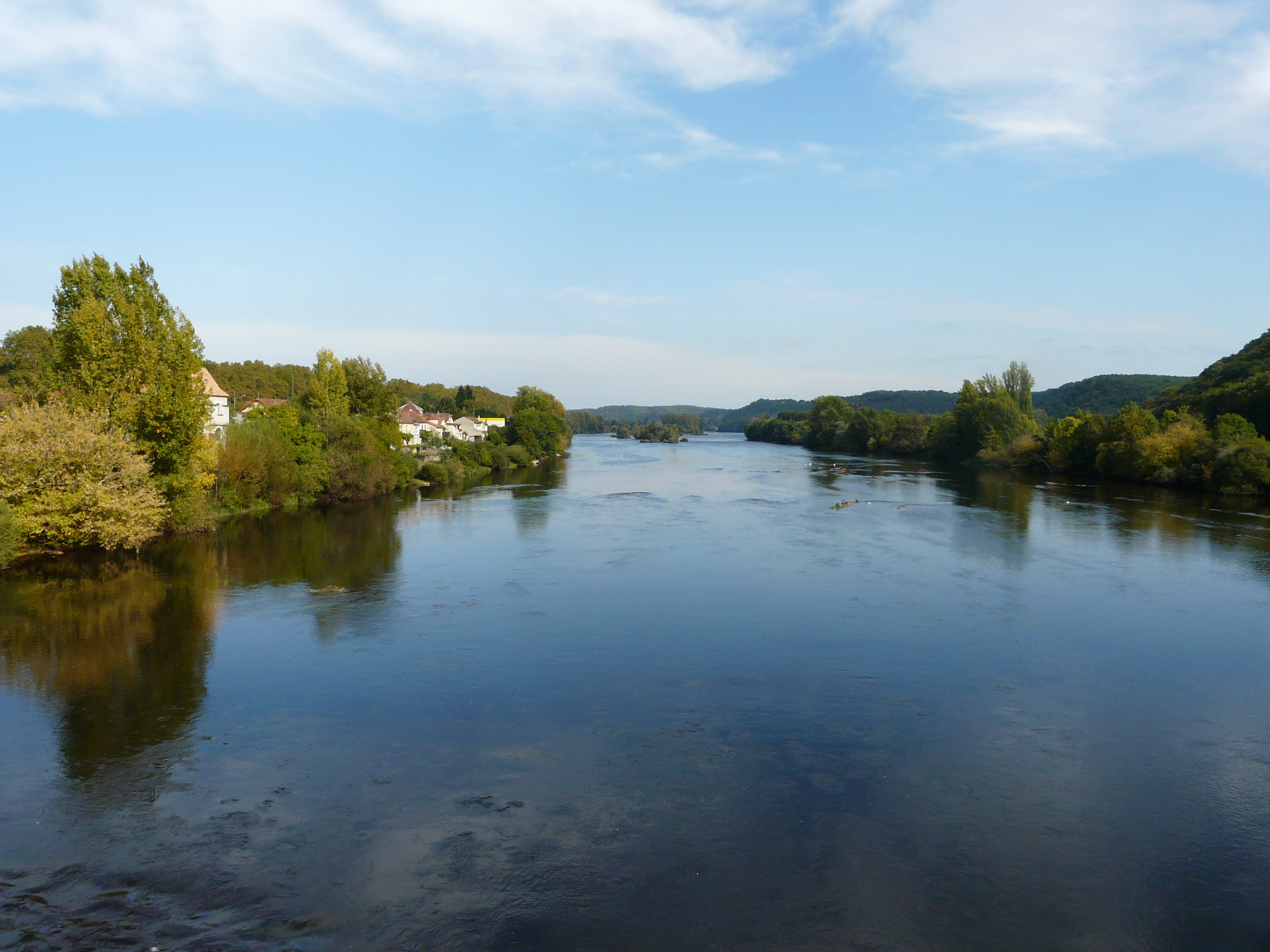 En amont du pont de Lalinde, la Dordogne sert de limite entre Lalinde à gauche et Couze-et-Saint-Front à droite ; Dordogne, France.